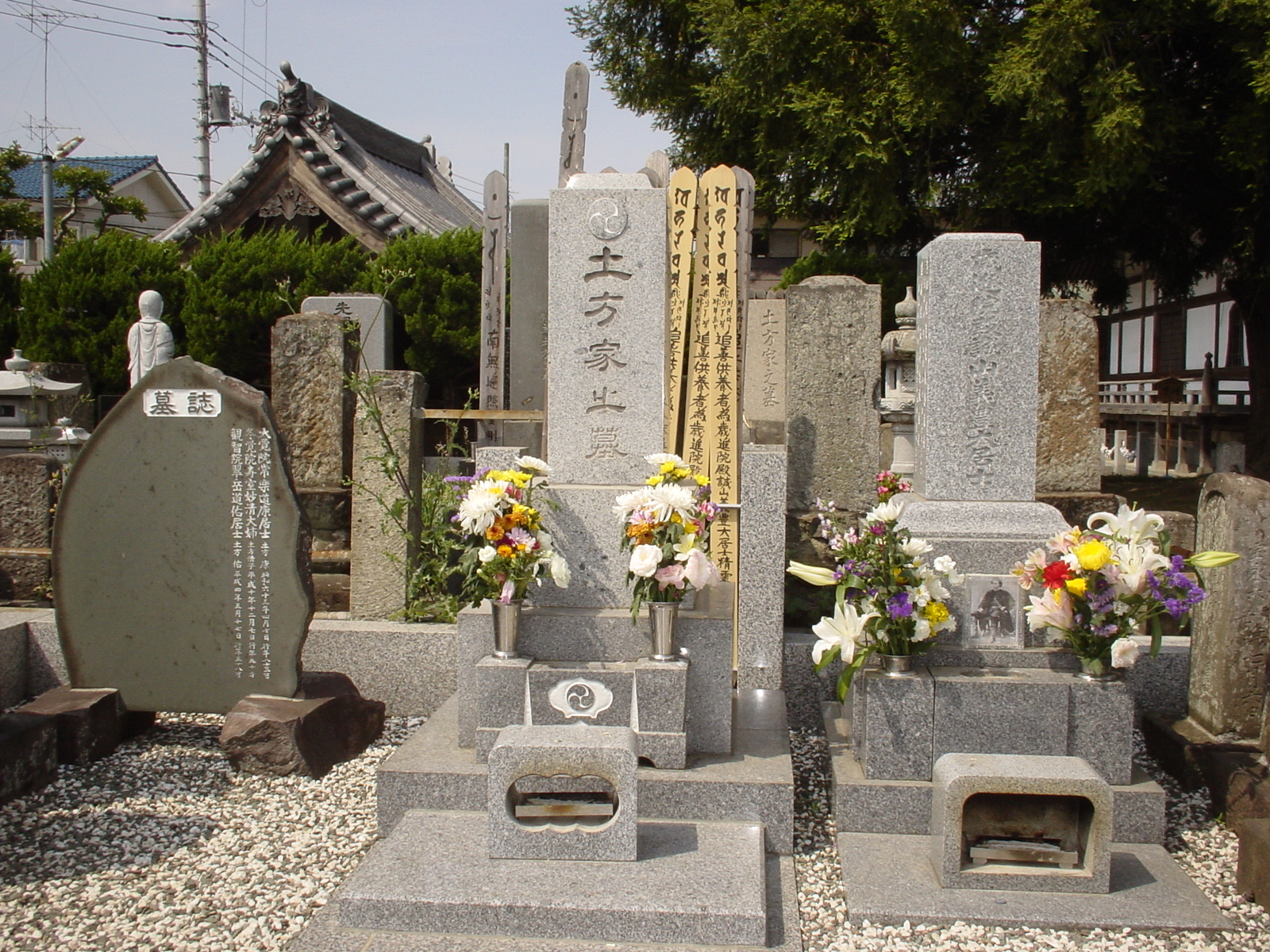 土方歳三の墓石（左は土方の墓、右が歳三の墓）（東京都日野市石田寺内）